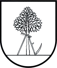 Herb miasta Chorostków